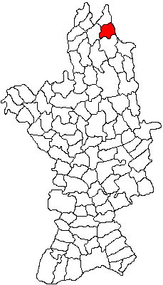 Categorie:Hărţi ale judeţului Olt